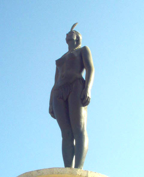 India Catalina, Cartagena de Indias, Colombia